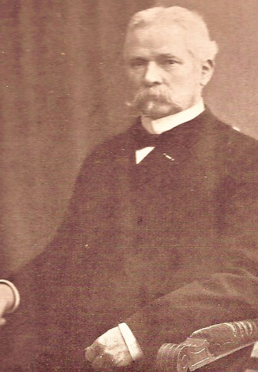 Burgemeester Bernardus Reiger